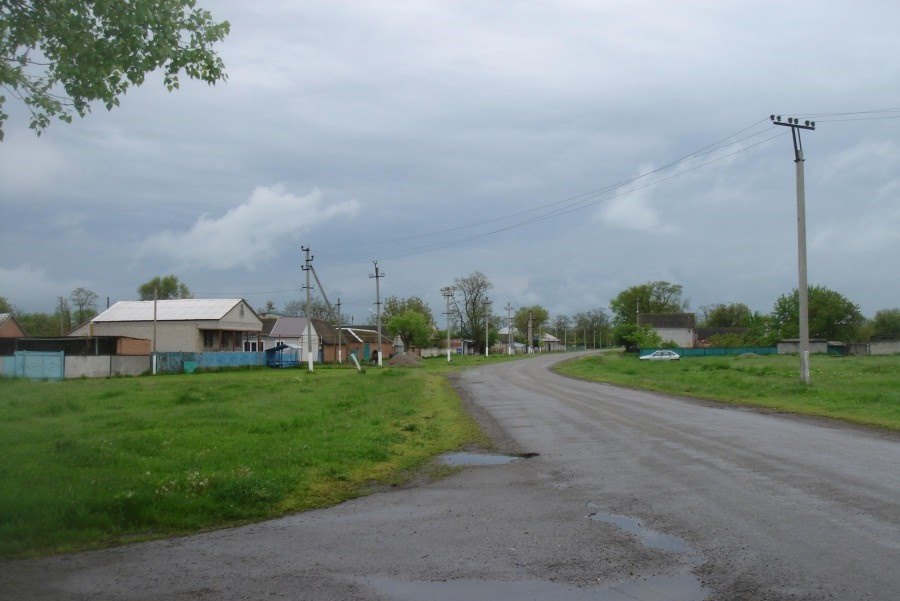 Въезд в аул Старо-Кувинск